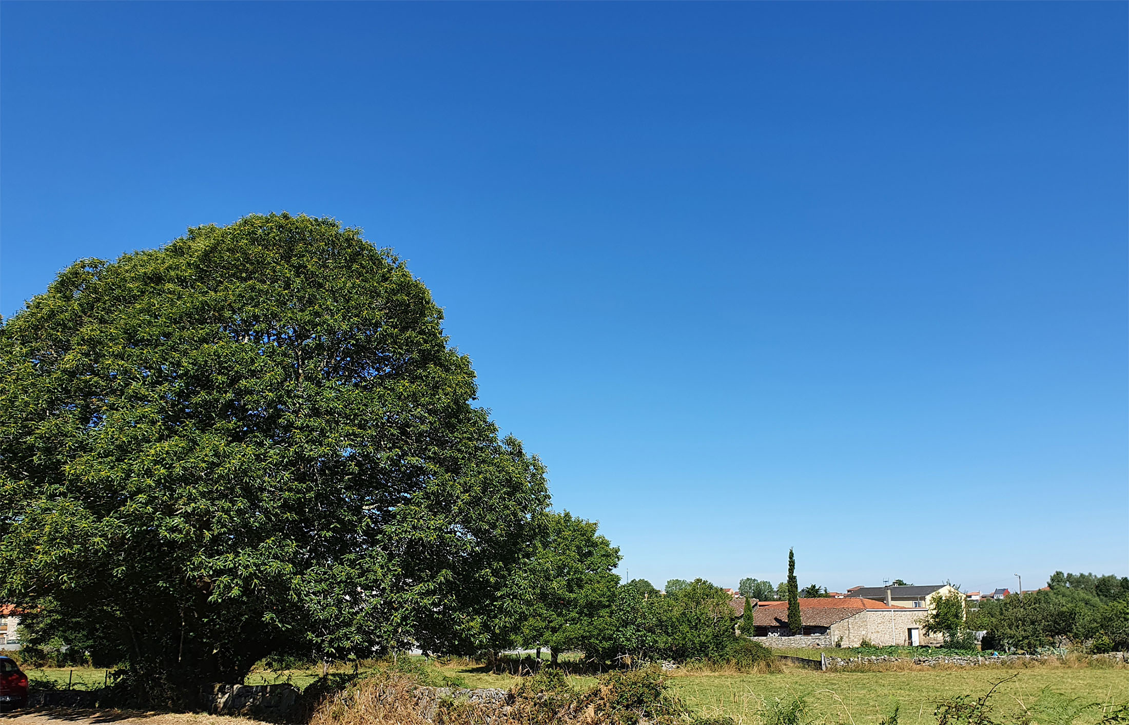 Vista xeral do lugar poboado de Regadío, en Antas de Ulla (Lugo)